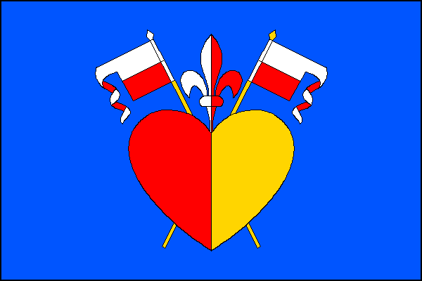 vlajka, Hluboké Mašůvky, okres Znojmo